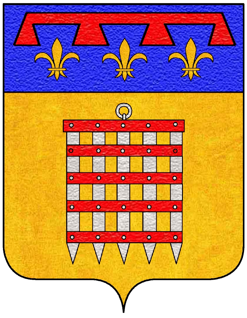 Stemma della famiglia Malavolti